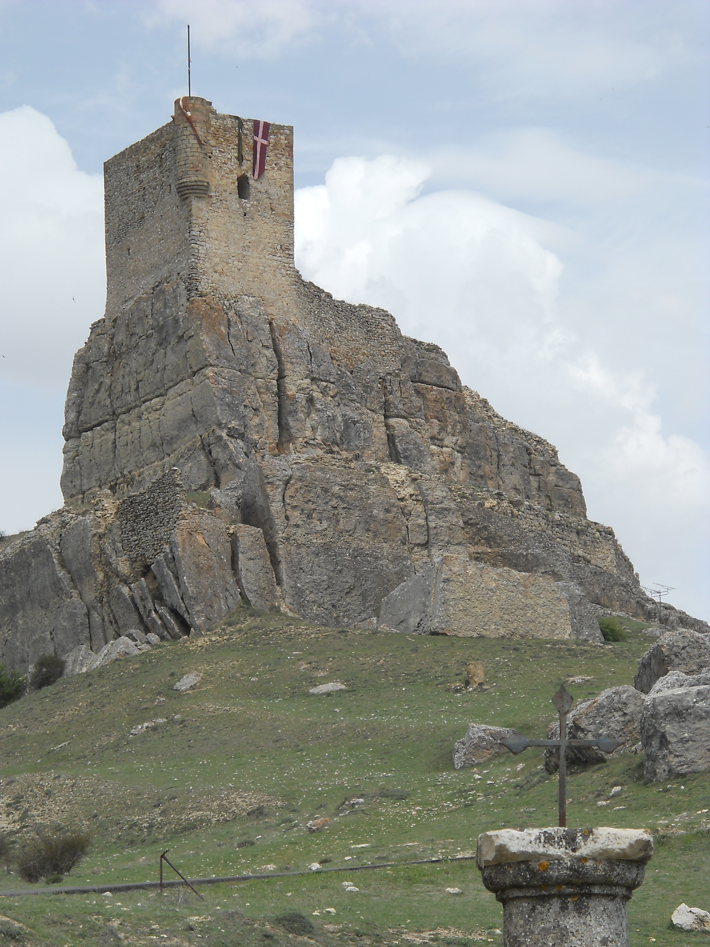 Castillo de Atienza, Guadalajara, España